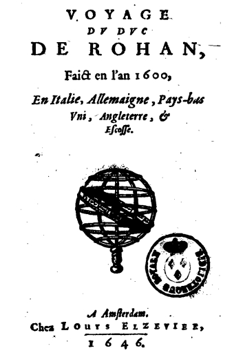 Title page of Voyage by Henri II de Rohan (1579-1638). Publié par Louis Elzevier, Amsterdam, 1646.